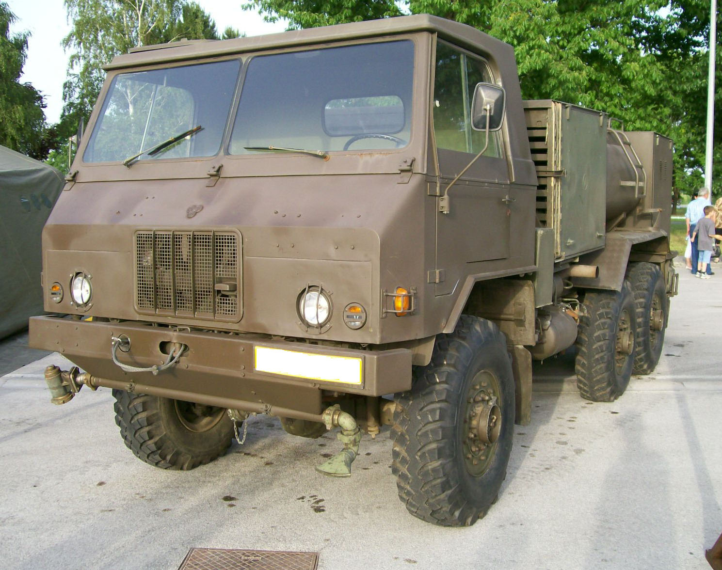 Autocisterna za dekontaminaciju ACD-M78